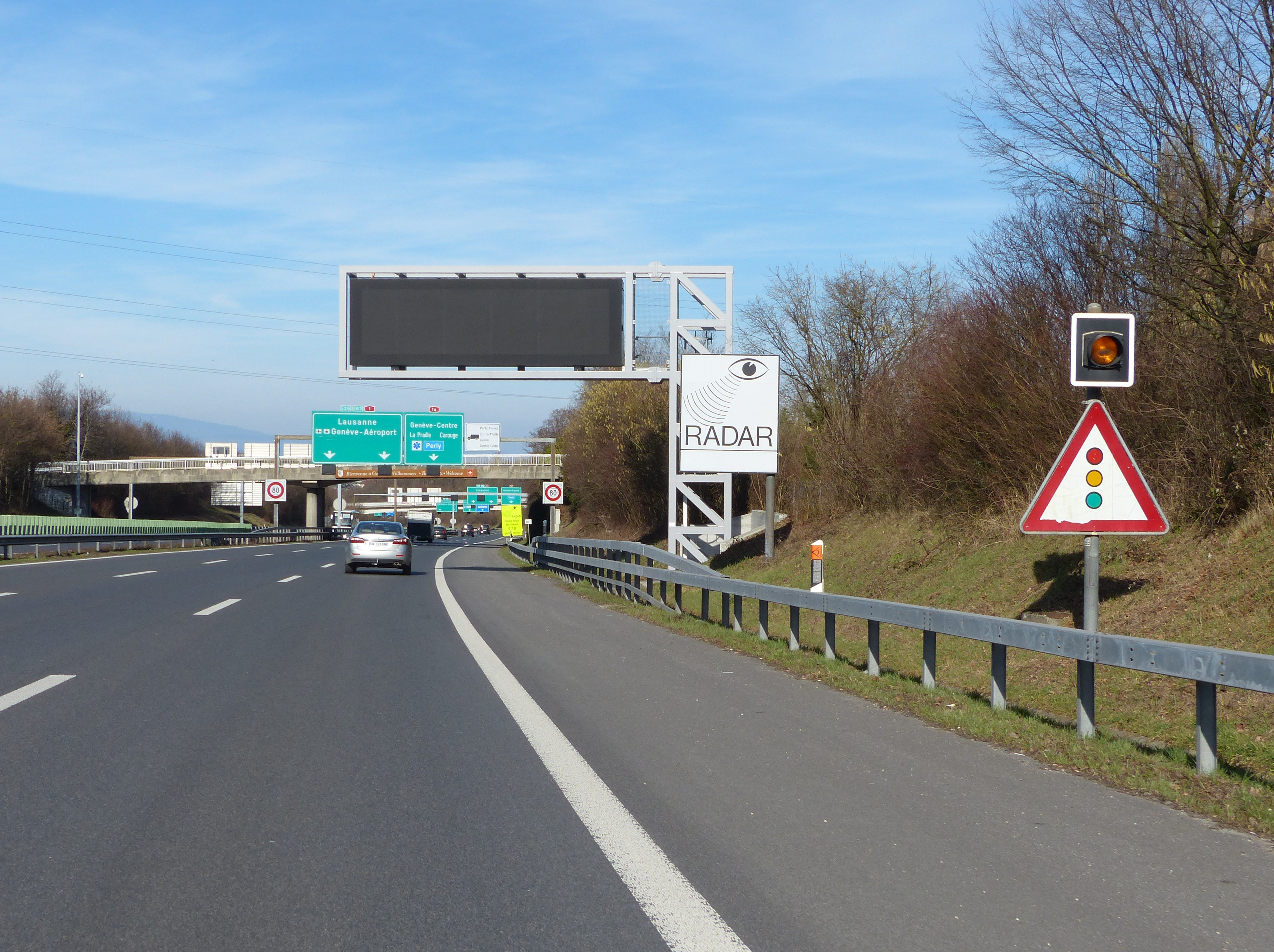 Panneau suisse 1.27 surmonté d'un clignotant, panneau radar, autoroute A1, Bardonnex, canton de Genève, Suisse.